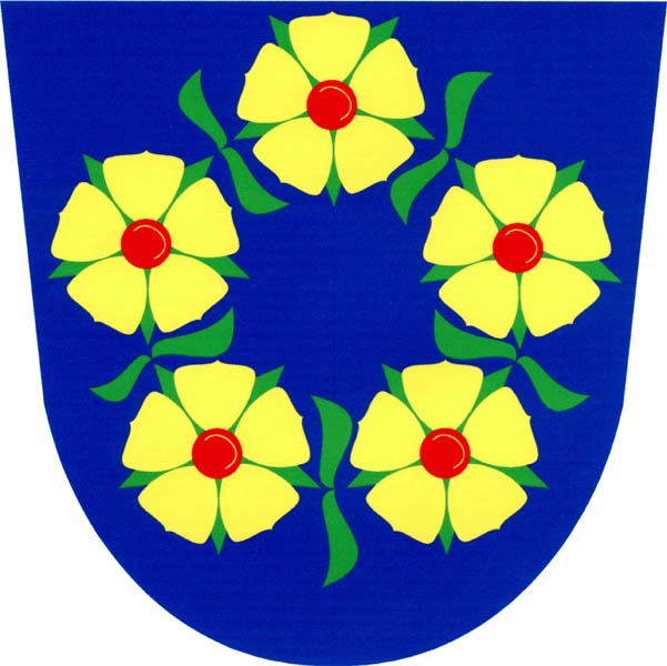 Znak obce Růžená